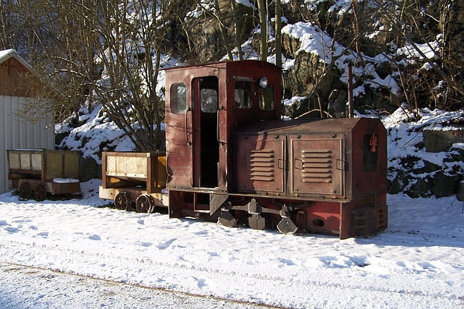 Feldbahn Blankenberg, Sammlung Feldbahn Blankenberg